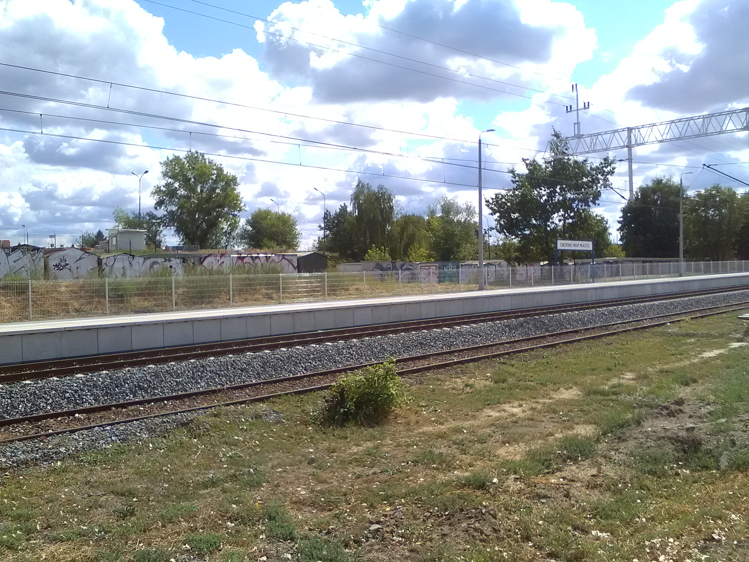 Stacja kolejowa Oborniki Wielkopolskie Miasto.